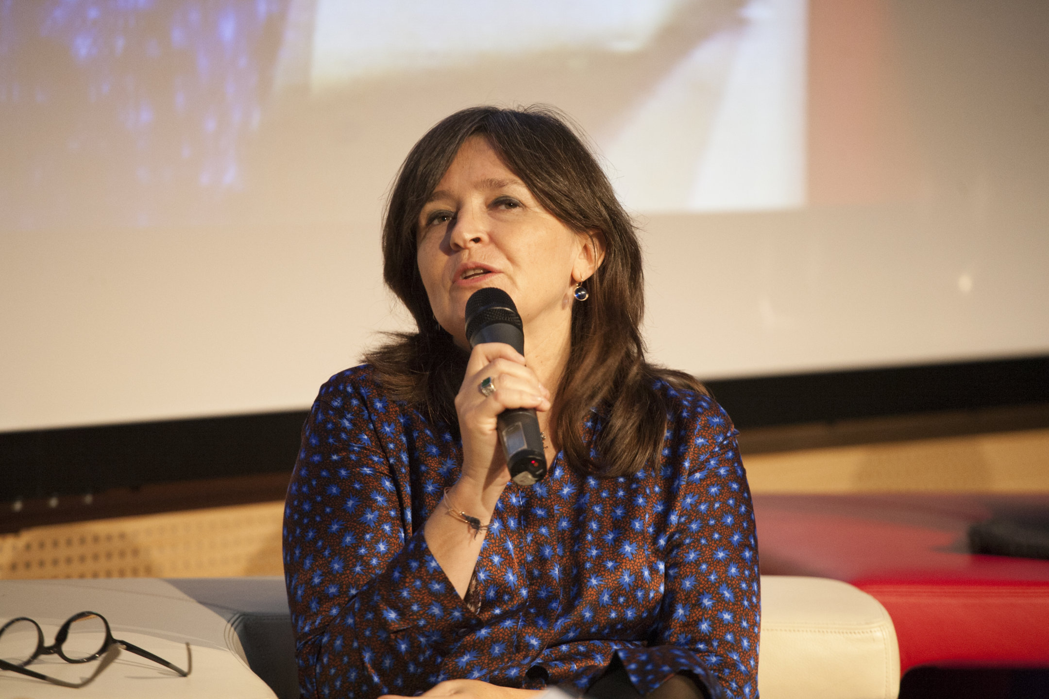 Beatrice Masini, scrittrice italiana